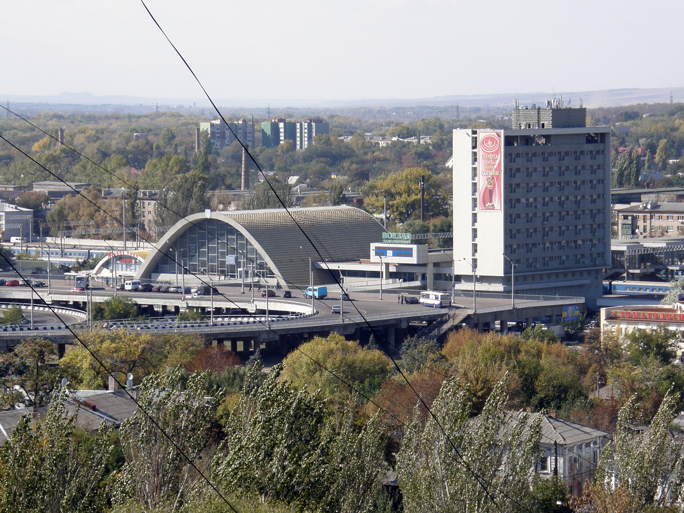 станция Луганск